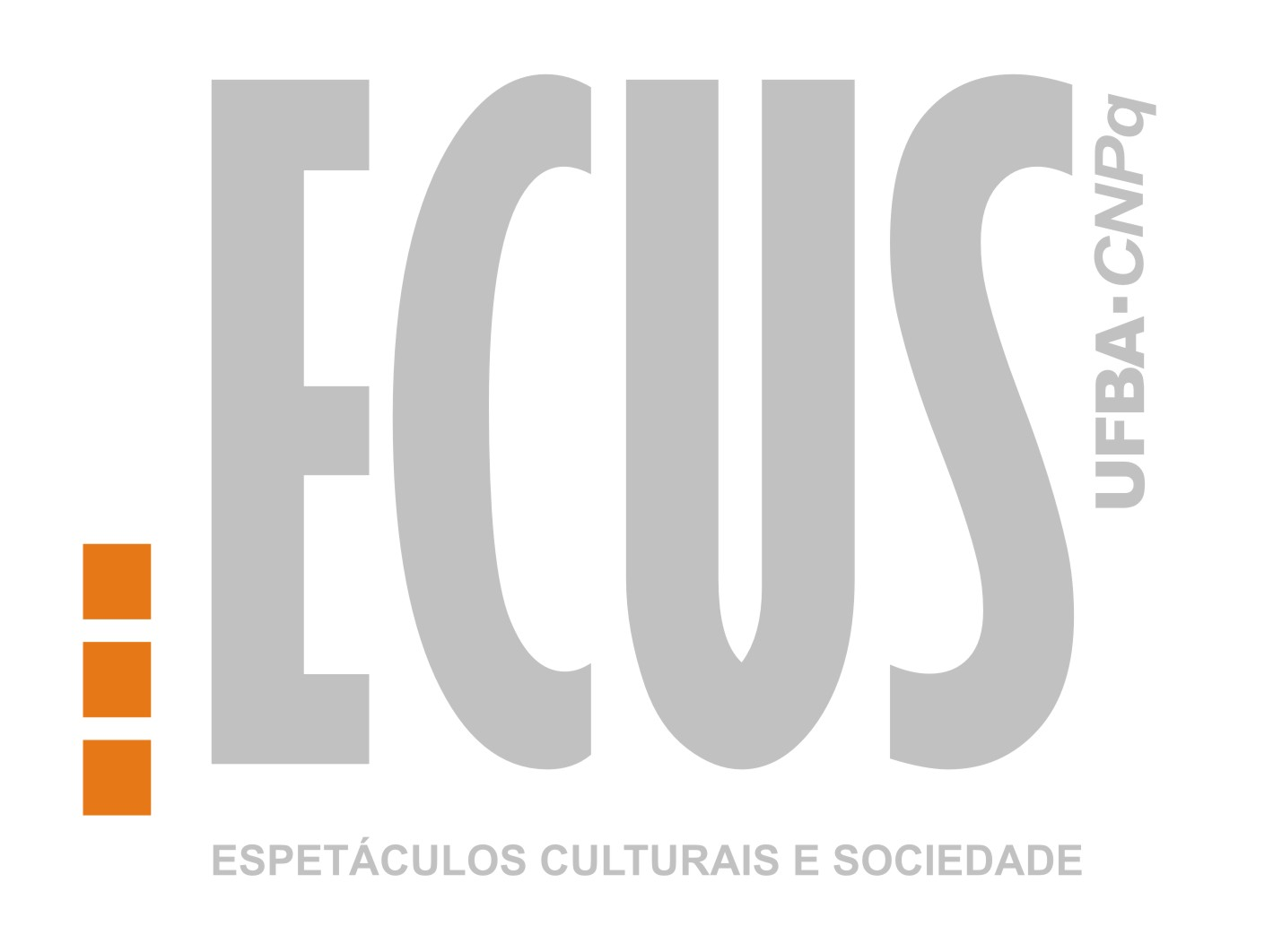 Logo do ECUS